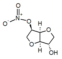 Isosorbiid-5-mononitraadi struktuur.